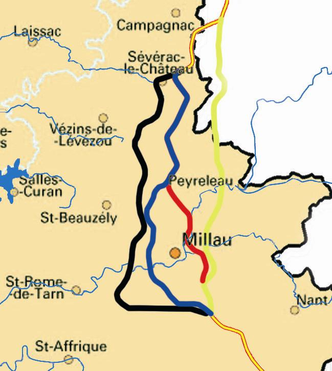 Tracés des projets pour l'autoroute A75 aux environs de Millau. Sources : Nepomuk Contents 1 Mails échangés pour définir la licence 1.1 Mail 1 : demande 1.2 Mail 2 : réponse 1.3 Mail 3 : demande de précisiona 2 Licensing 3 Original upload log Mails échangés pour définir la licence Mail 1 : demande Je vous écris pour savoir ce qu'il en est des licence des cartes présentes sur votre site. En effet, j'aimerai en utiliser une pour illustrer l'encyclopédie Wikipedia sans pour autant vous faire du tort. Merci d'avance de votre réponse Mail 2 : réponse Bonjour Nepomuk, Il n'y a pas de problèmes pour voir nos cartes figurer sur Wikipedia, d'autant plus que certains contributeurs nous ont déjà demandé, et vous pouvez donc trouver quelques unes de nos cartes sur le site. Merci simplement de nous envoyer l'adresse de la page concernée. Cordialement Pour l'équipe du SPLAF, Yann Mail 3 : demande de précisiona Tout d'abord MERCI pour votre réponse. En fait je l'ai utilisé pour illustré l'article : mais rai une précision. Lla licence GPL est elle appropriée à vos média? Encore merci